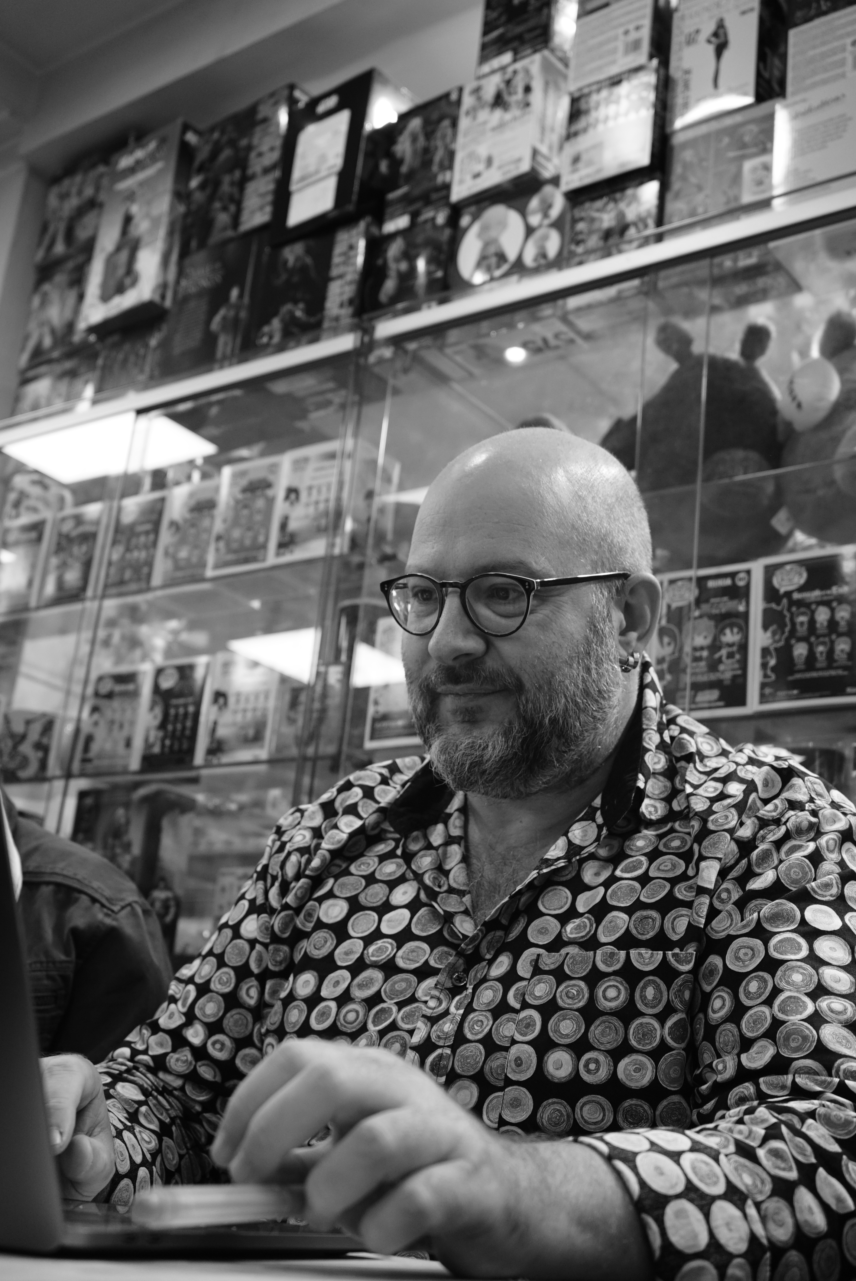 en dédicace à la boutique Bédérama.